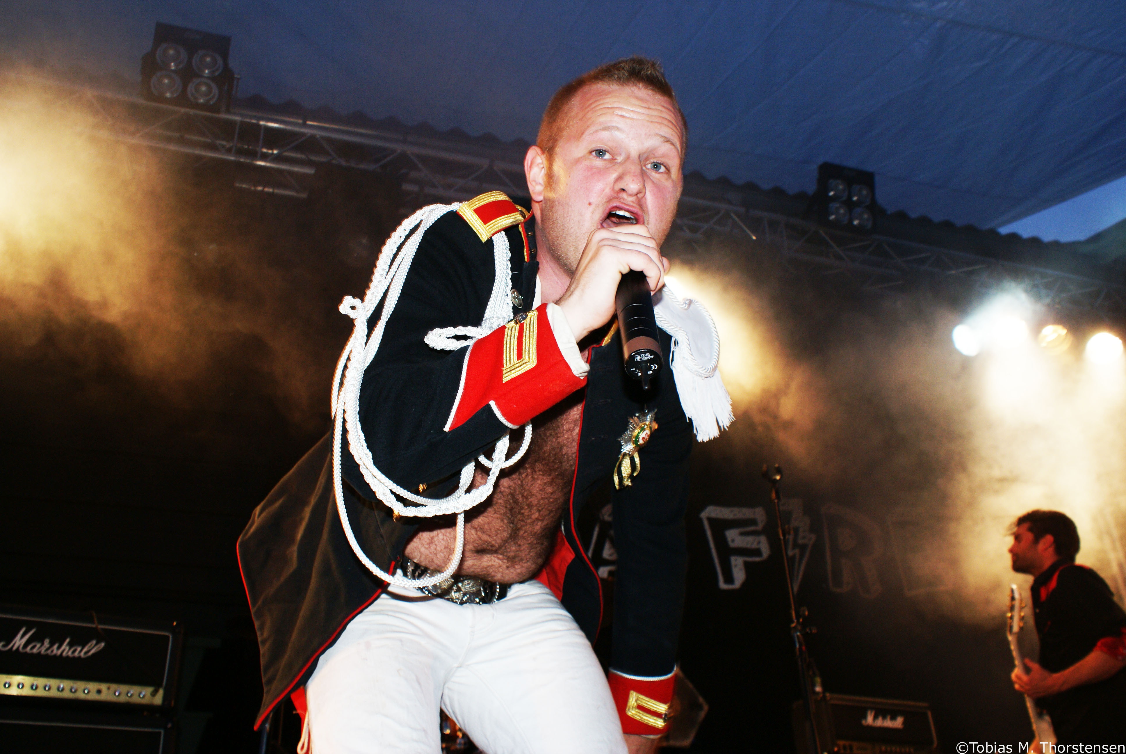 Bilde Yoga Fire konsert. Tatt av: Tobias Moe Thorstensen.